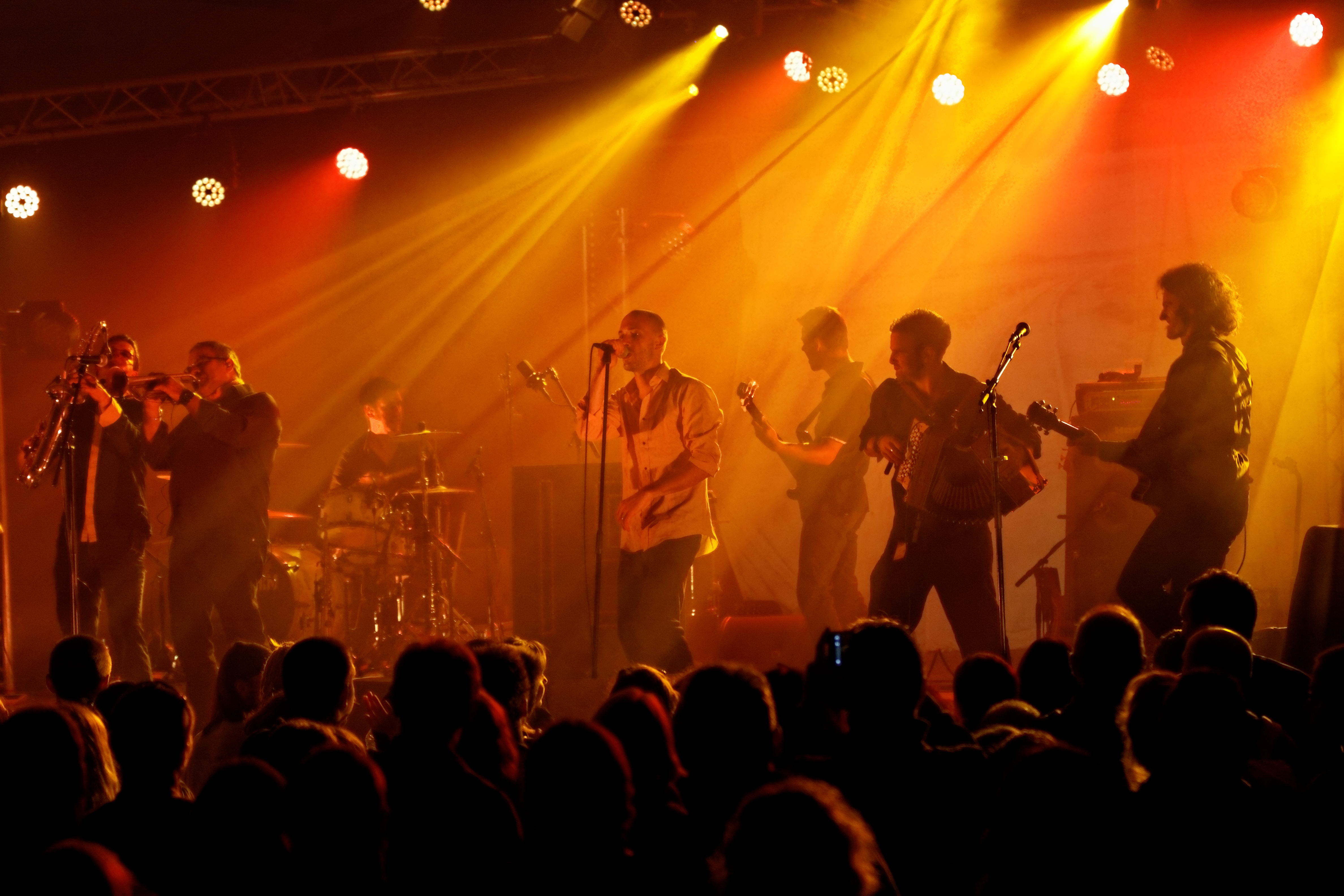 Merzhin en concert à l'espace évêché lors du festival de Cornouaille 2012.